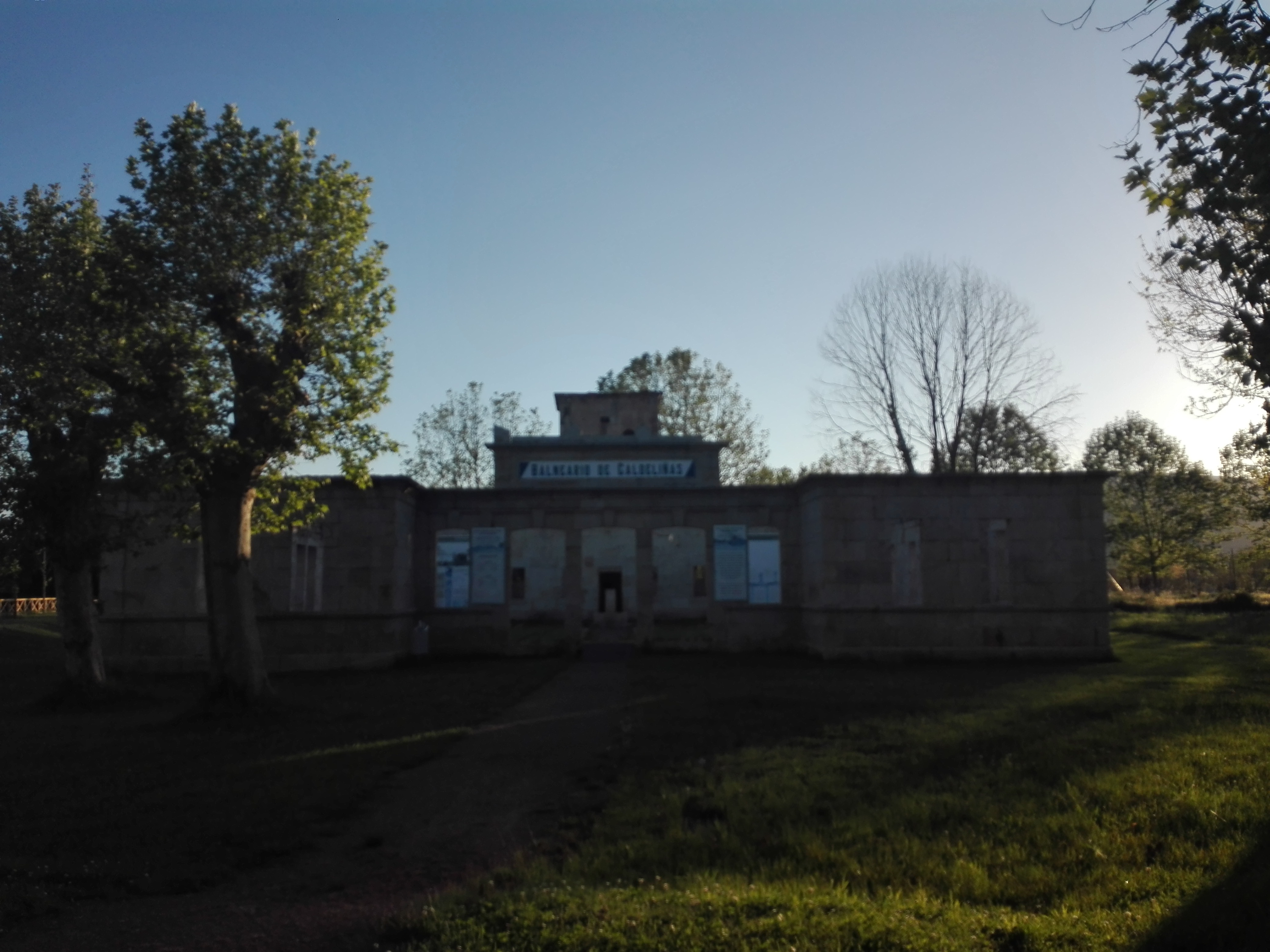 O Balneario de Caldeliñas, 2019